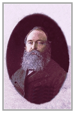 Промышленик из Новой Гольчихи (Вичуга), Потомственный почетный гражданин, дядя Андрея Малахиевича Миндовского. Ему принадлежал дом, в котором теперь помещается Горсовет Шуи.